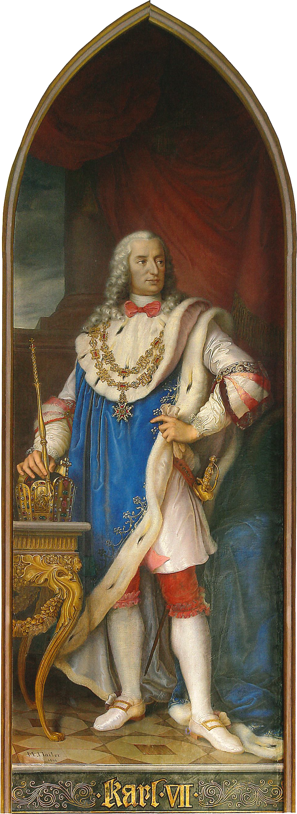 Gestiftet von Arnold von Mieg, Staatsrat und eine Gruppe patriotischer Bayern. Das Gemälde ist Teil der Herrschergalerie im Kaisersaal des Hauses zum Römer im Frankfurter Rathaus und gehört zum Bestand des Historischen Museums Frankfurt am Main.